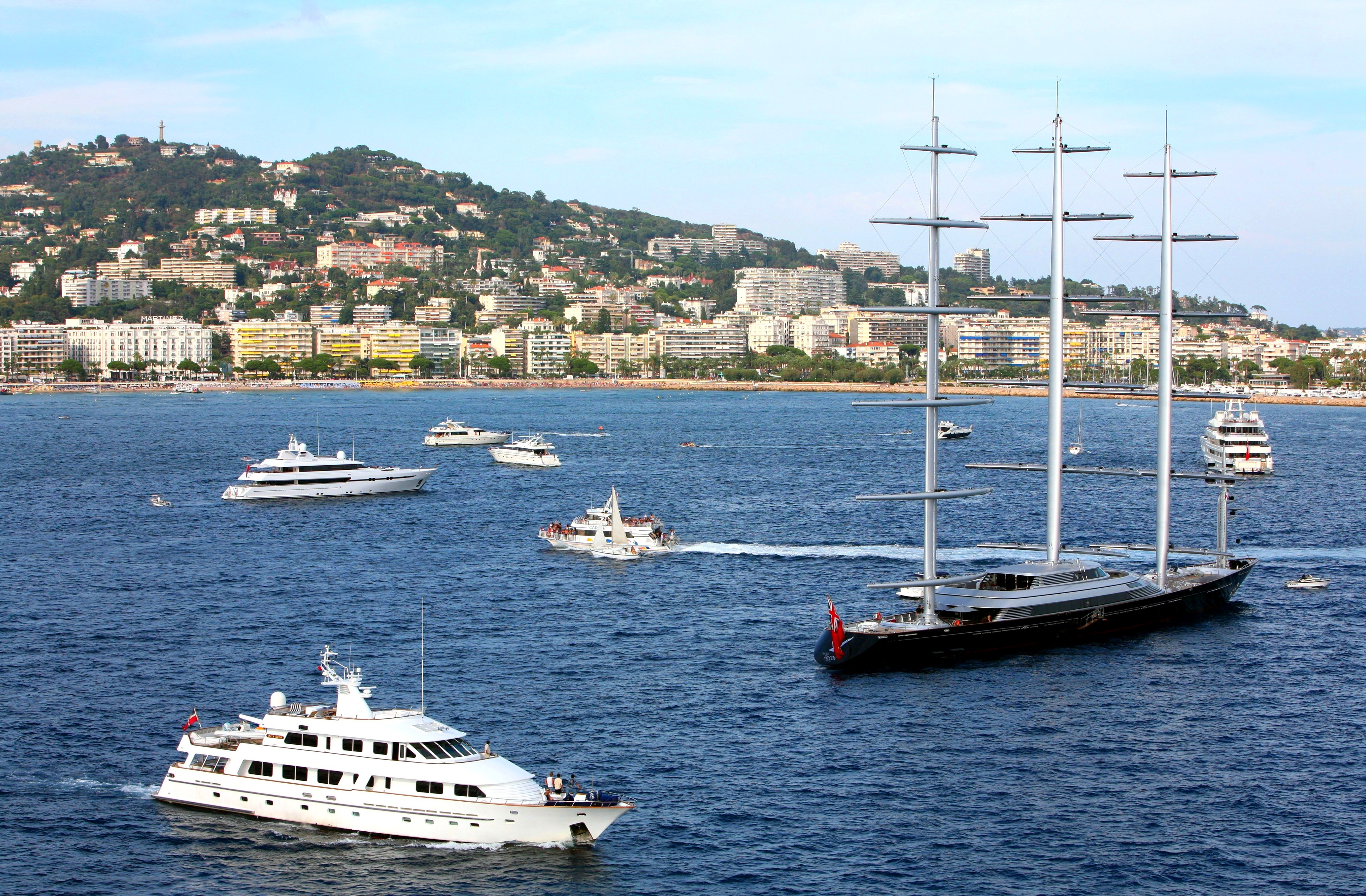 Cannes, France (little boats)